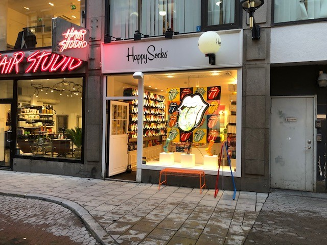 החנות הראשונה של Happy Socks